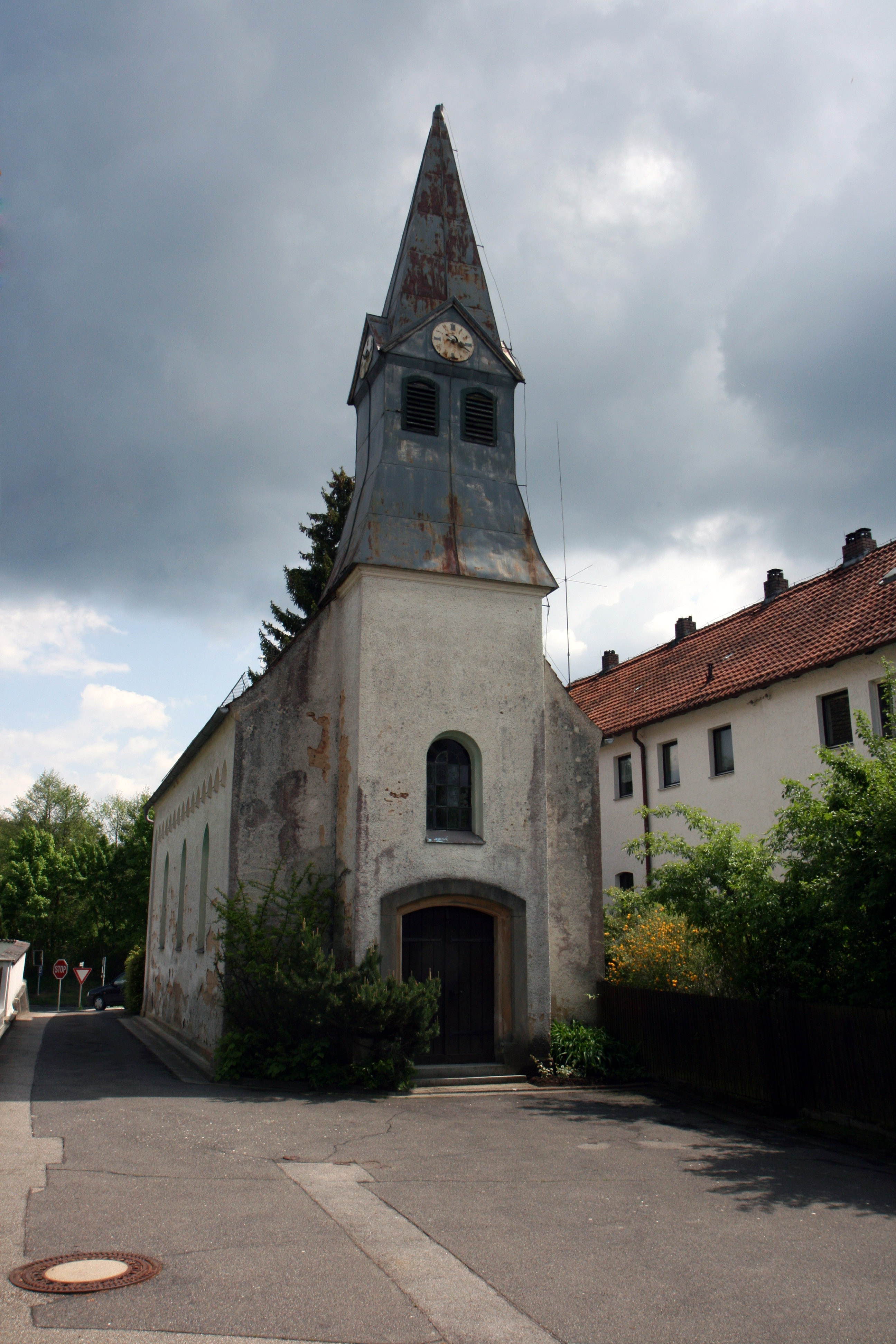 Die Taucherkapelle 2010 außen